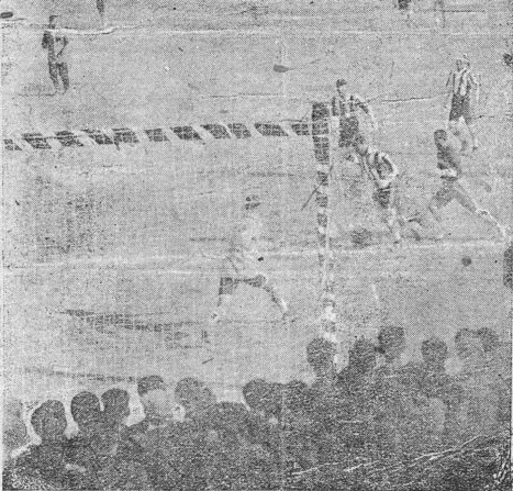 1922년 전국체육대회 축구(제3회 전조선축구대회) 중학부 휘문고등보통학교와 청년학관의 경기 모습.